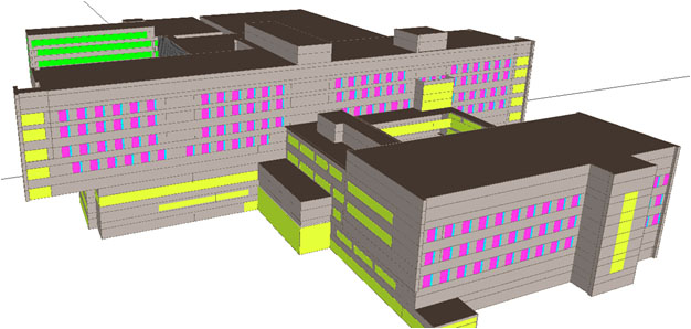 Syska Hennessy